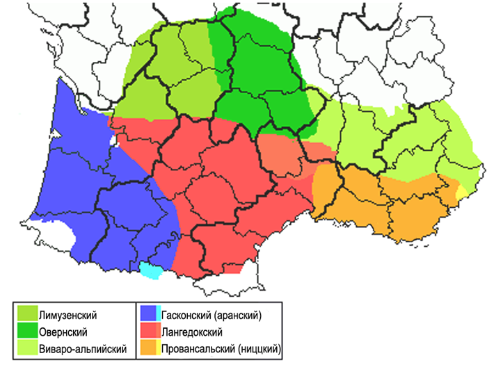 Карта окситанских диалектов